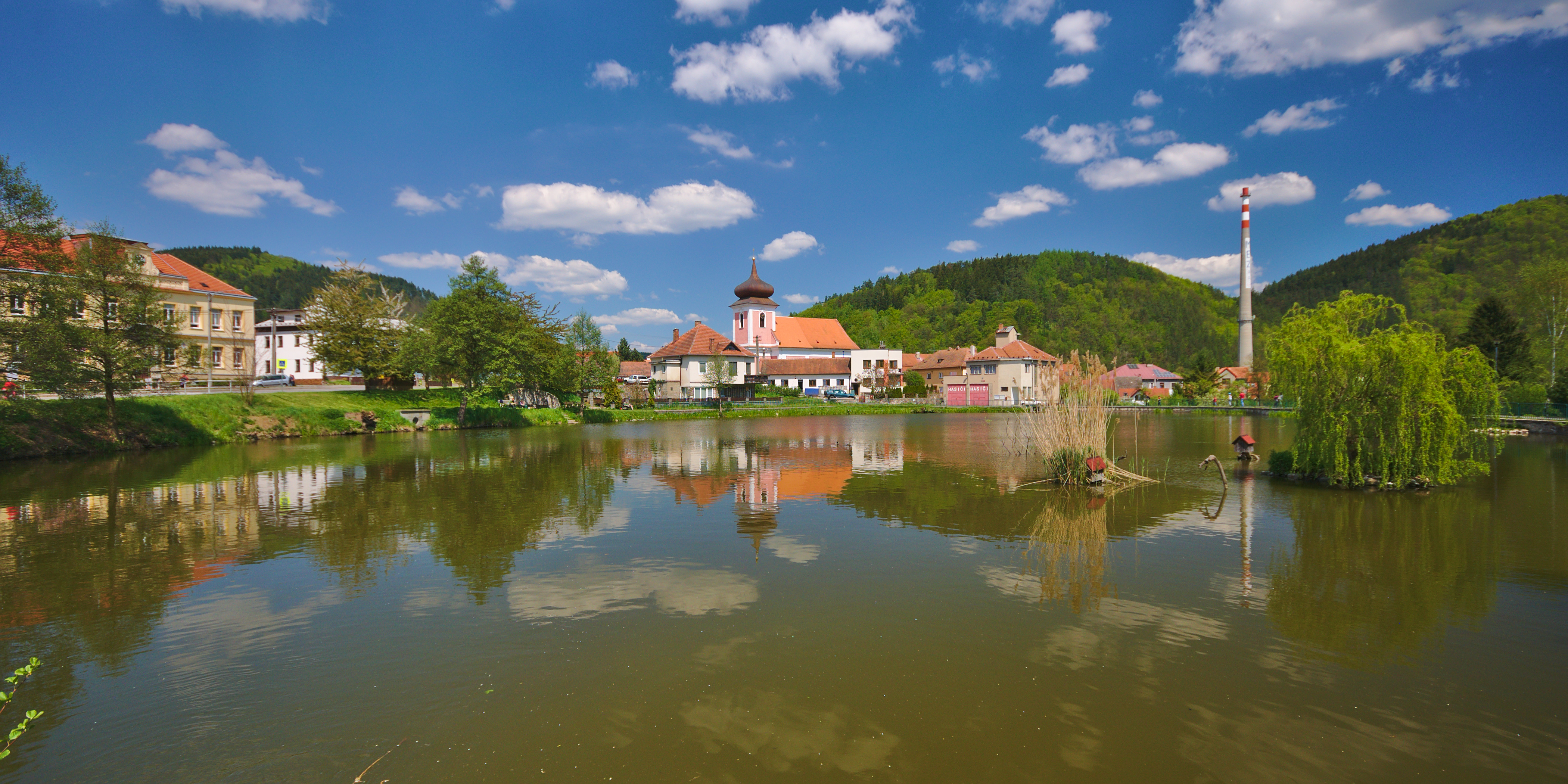 Pohled na městys přes rybník, Nedvědice, okres Brno-venkov